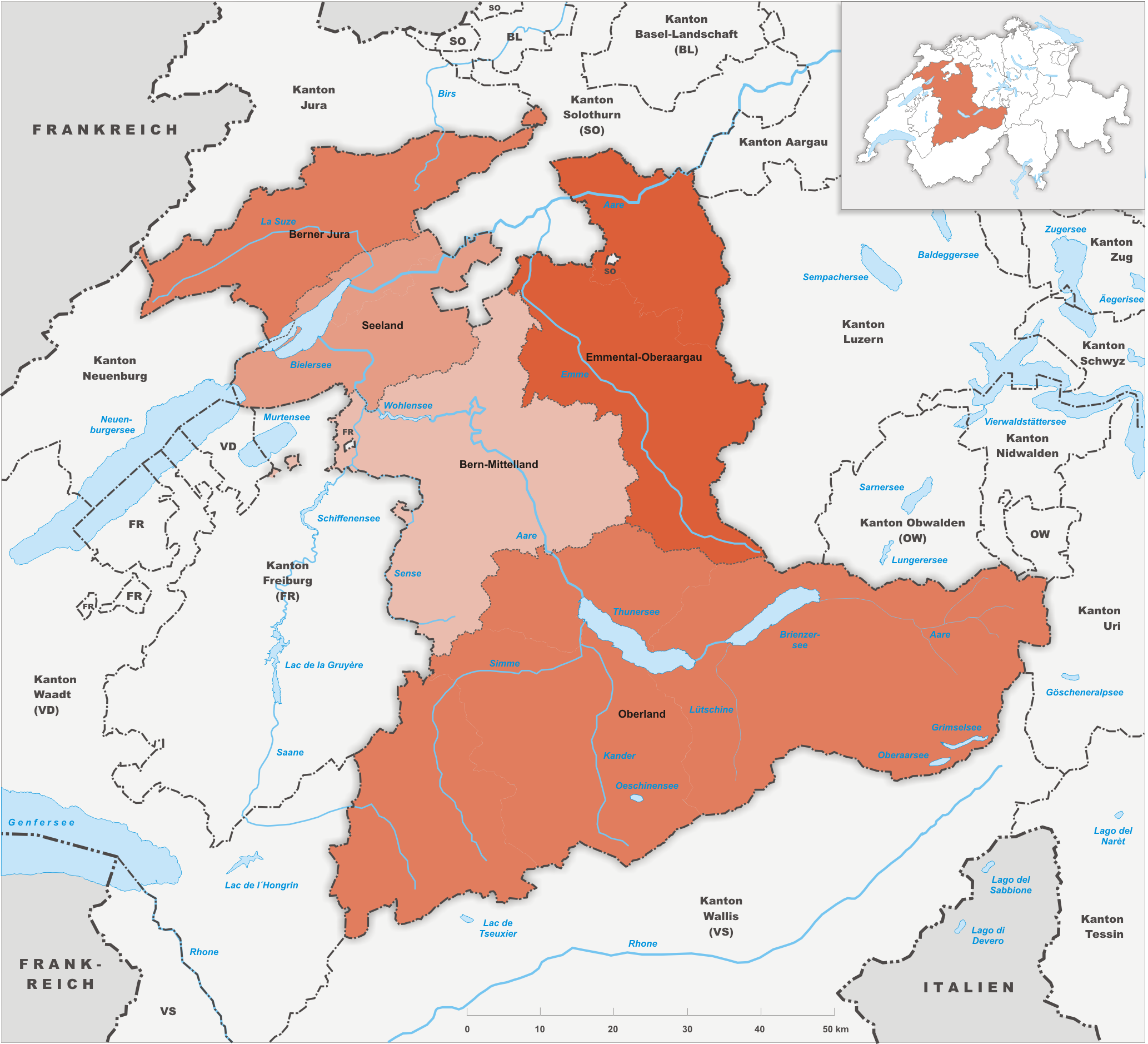 Verwaltungsregionen des Kanton Bern